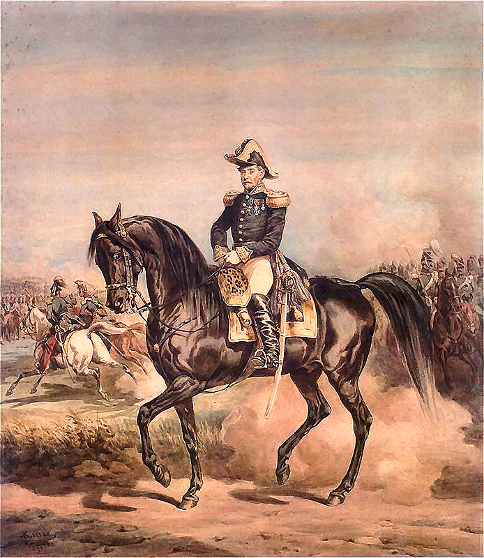 General Ignacy Kruszewski